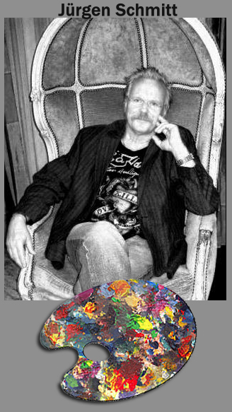 Juergen Schmitt,Schmitti - Künstler und Musiker